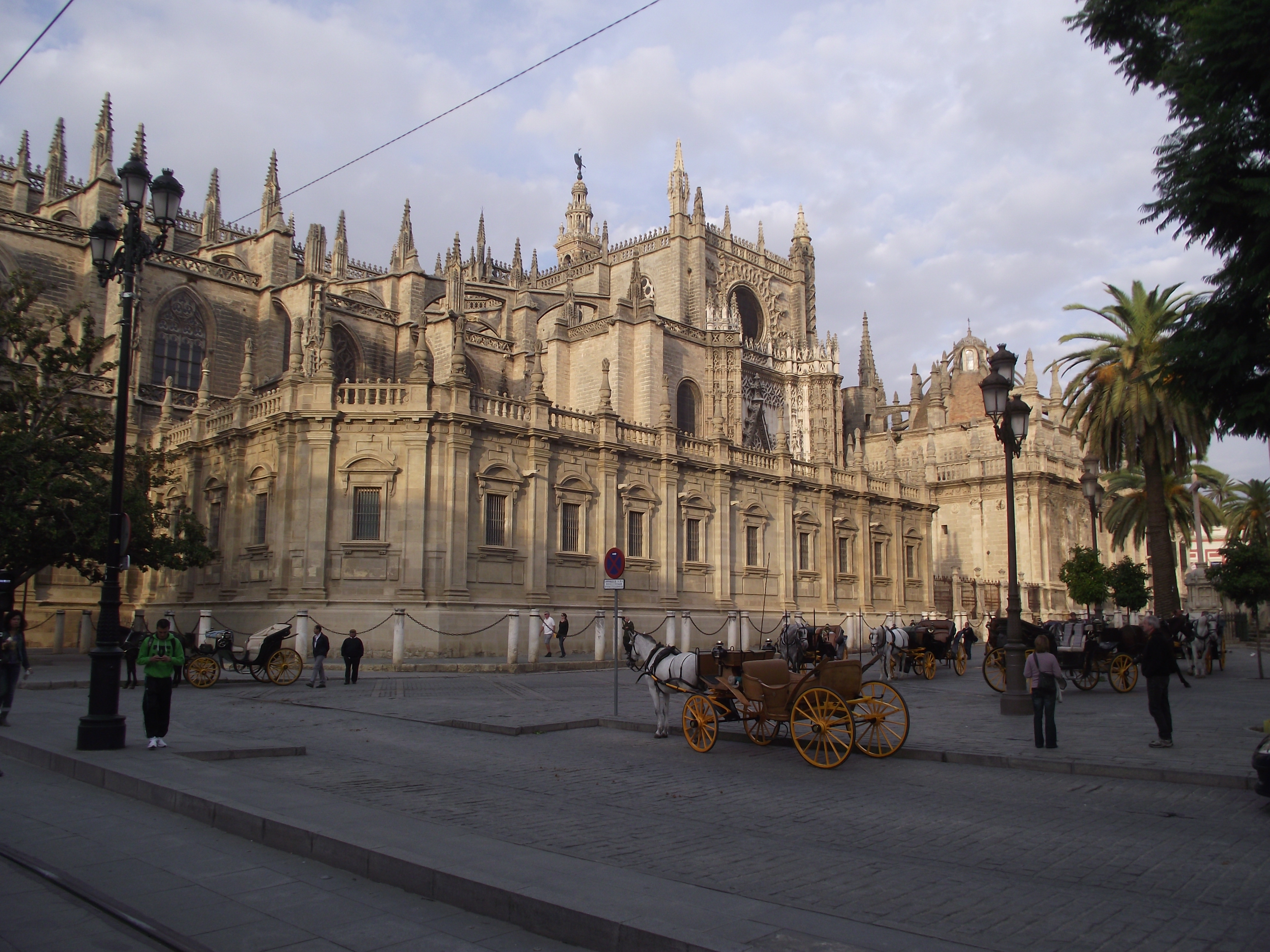 Paarden koetsen voor de ingang van de kathedraal